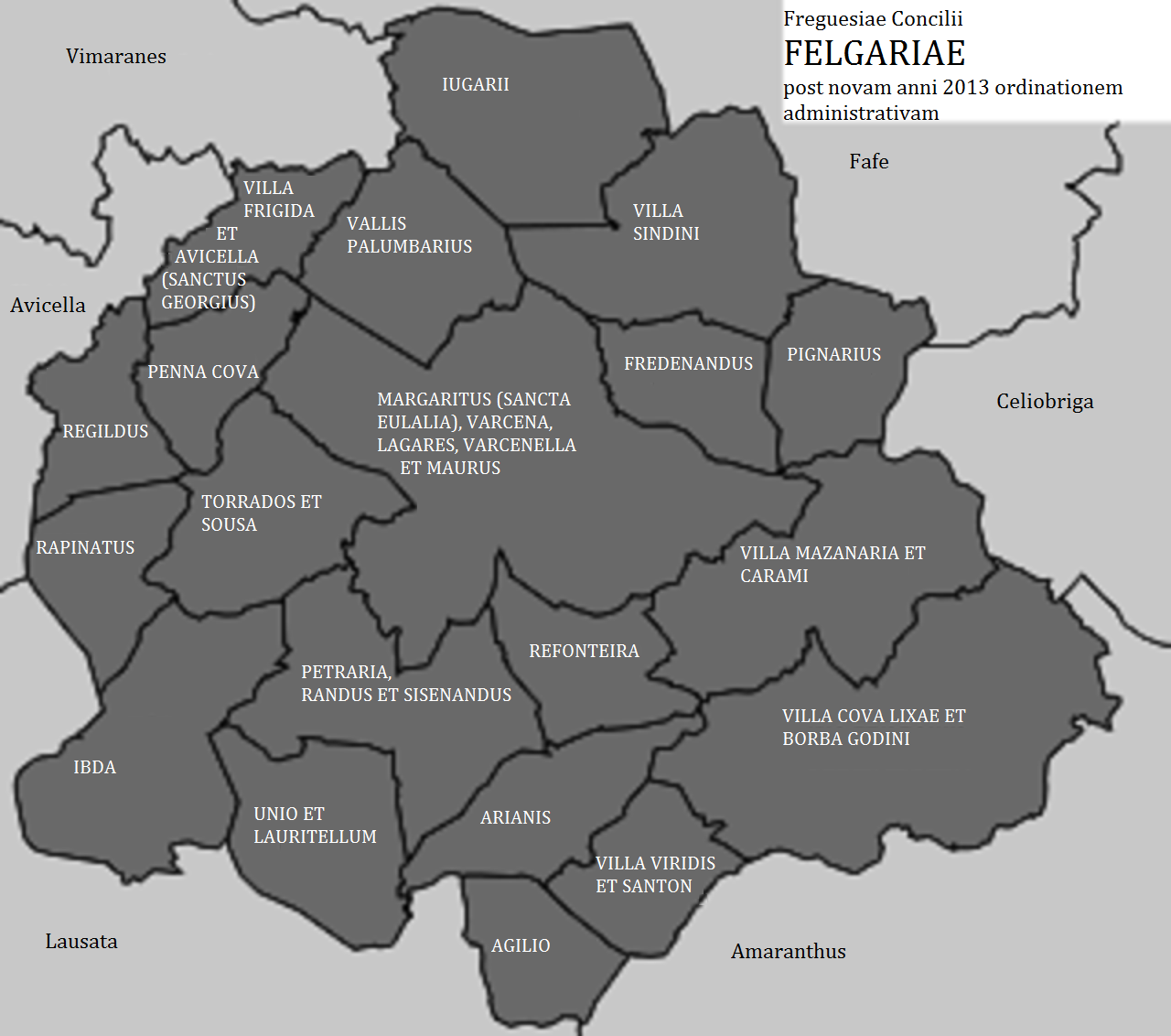 Concilii Felgariae freguesiae post novam anni 2013 ordinationem administrativam.